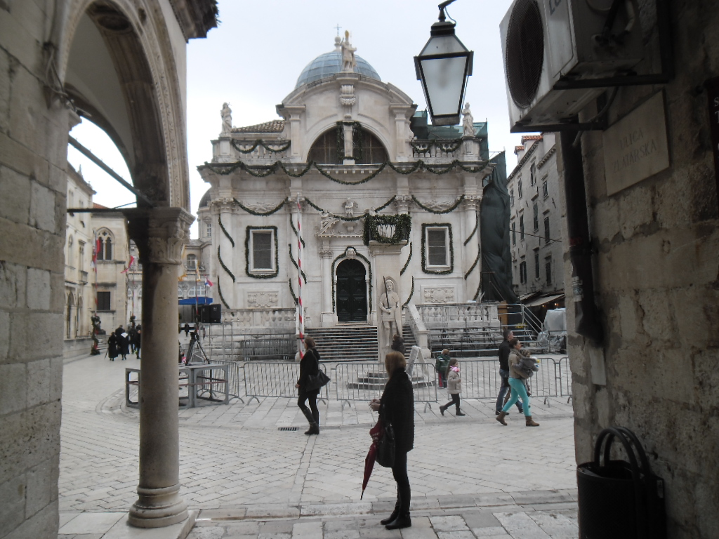 Crkva sv. Vlaha na Kandeloru